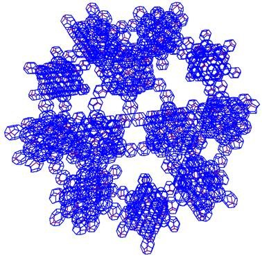 Egy ikozidodekaédergömb néhány lapja